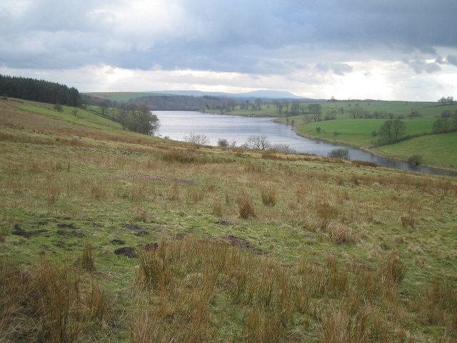 Winterburn reservoir